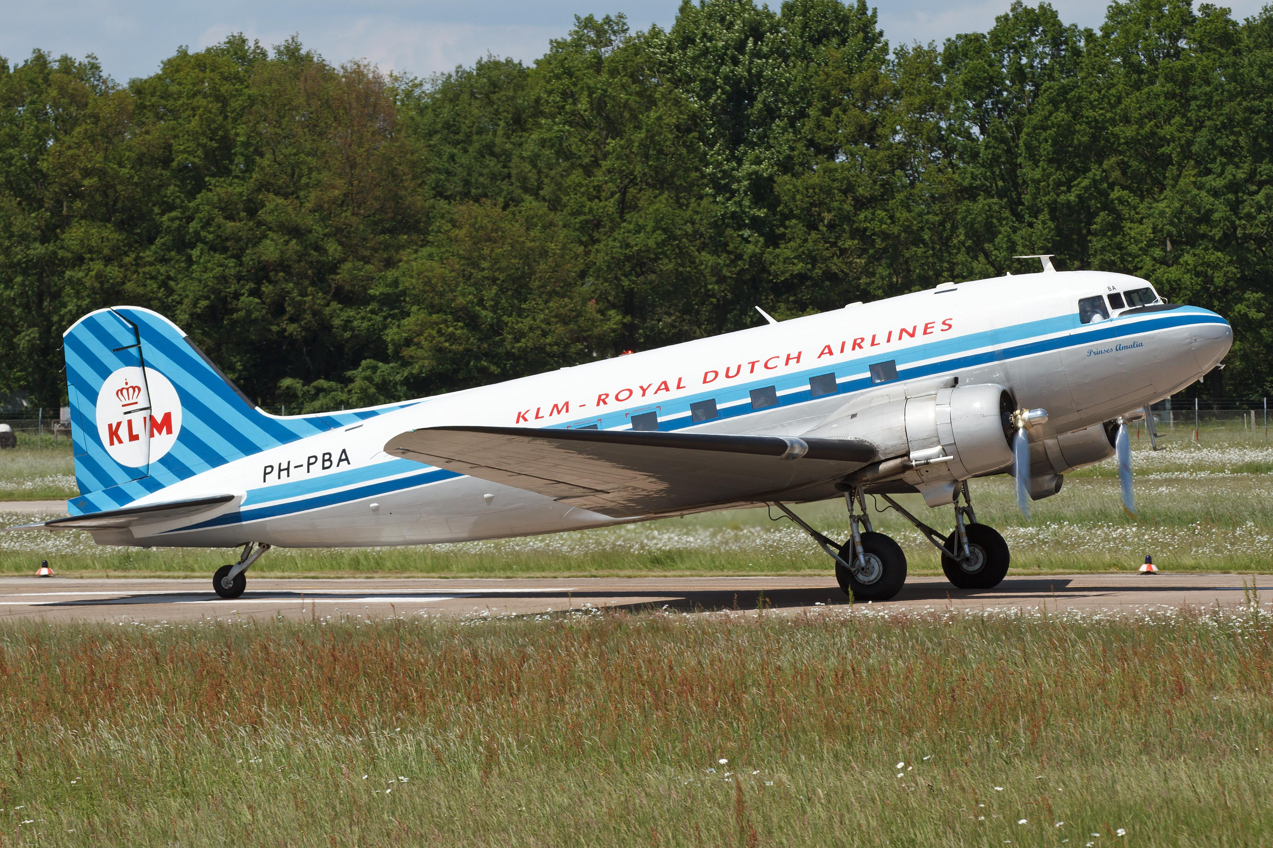 HAJ 05-06-13